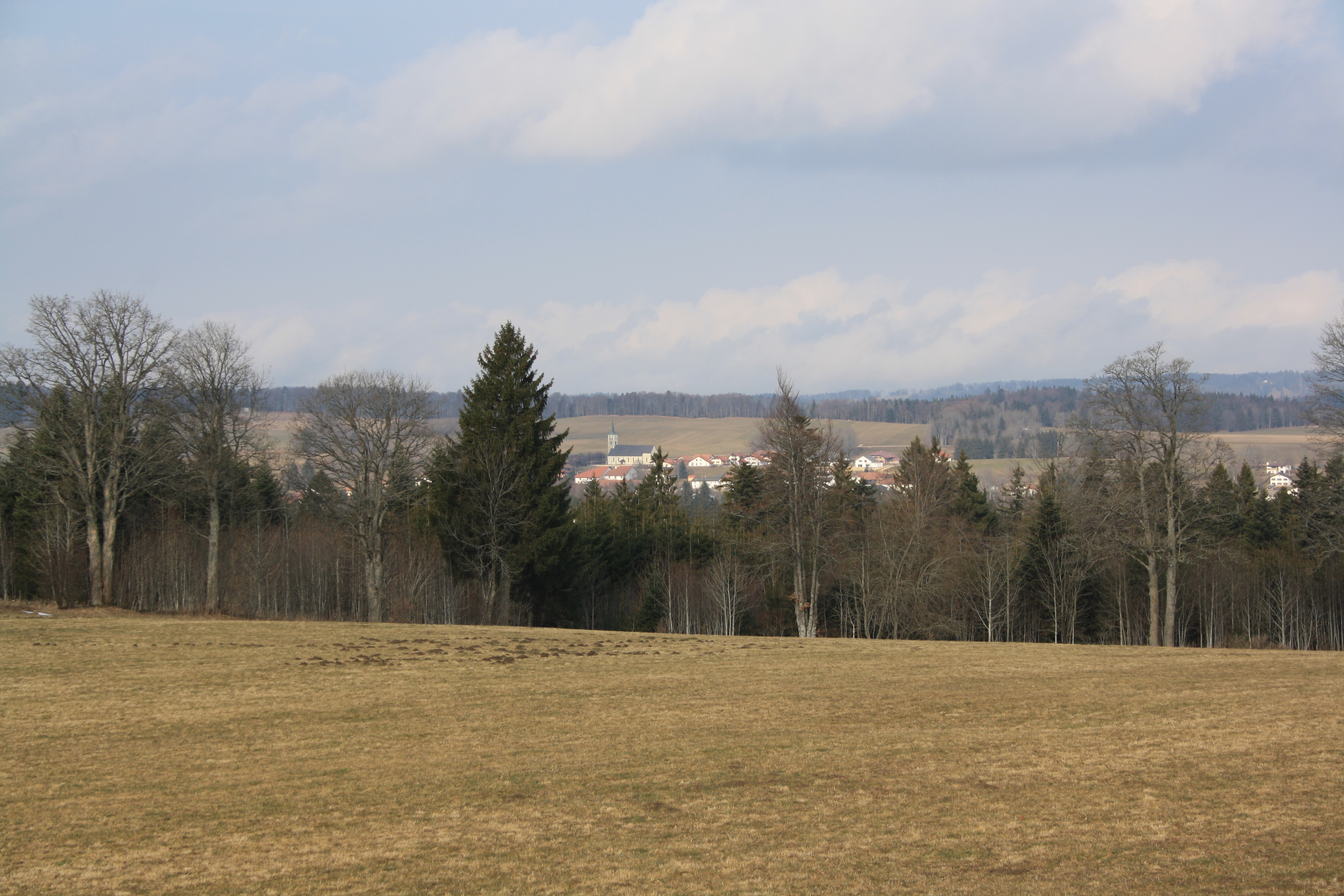 Blick vom Montbautier auf Les Genevez JU